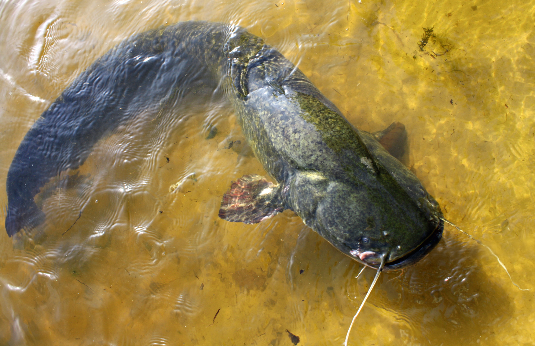 Сом Silurus glanis, вагою 15 кг, Дніпро біля с.Ходорів (Миронівський район)